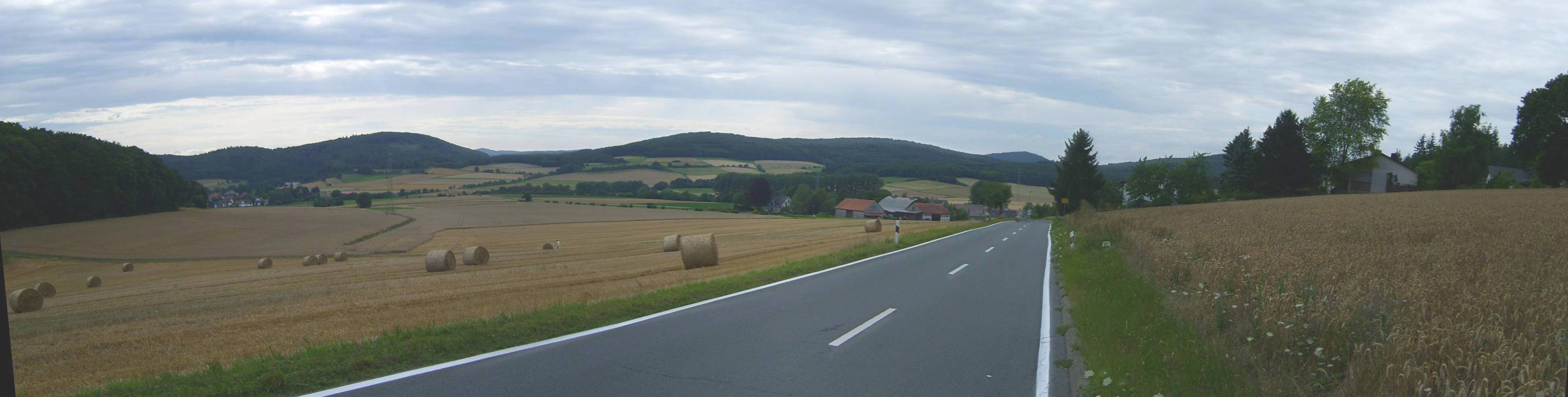 Der äußerste Nordosten der Damshäuser Kuppen mit Auersberg (385m, links), Stackelberg und Koppe (366 bzw. 385m, Mitte) und Hungert (412m, rechts, teils verdeckt. In hinterer Reihe erkennt man rechts des Auersberges den Allberg (528m) am Ostrand der Bottenhorner Hochflächen, an den sich links der 552m hohe Daubhaus anschlösse, und den Rimberg unmittelbar oberhalb der Straße. Im Vordergrund Dagobertshausen, links hinten Elnhausen